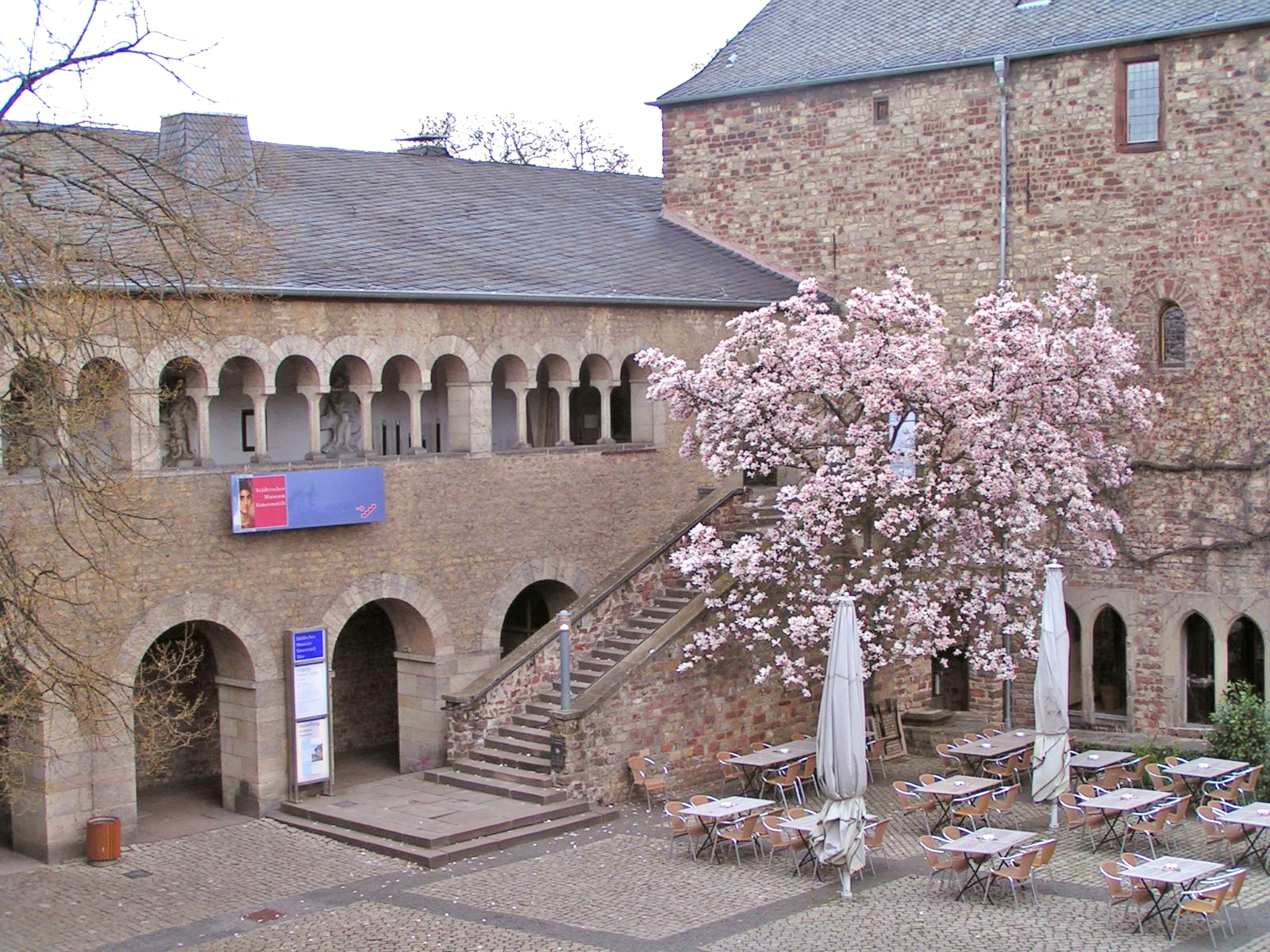 Simeonstëftsmusée zu Tréier